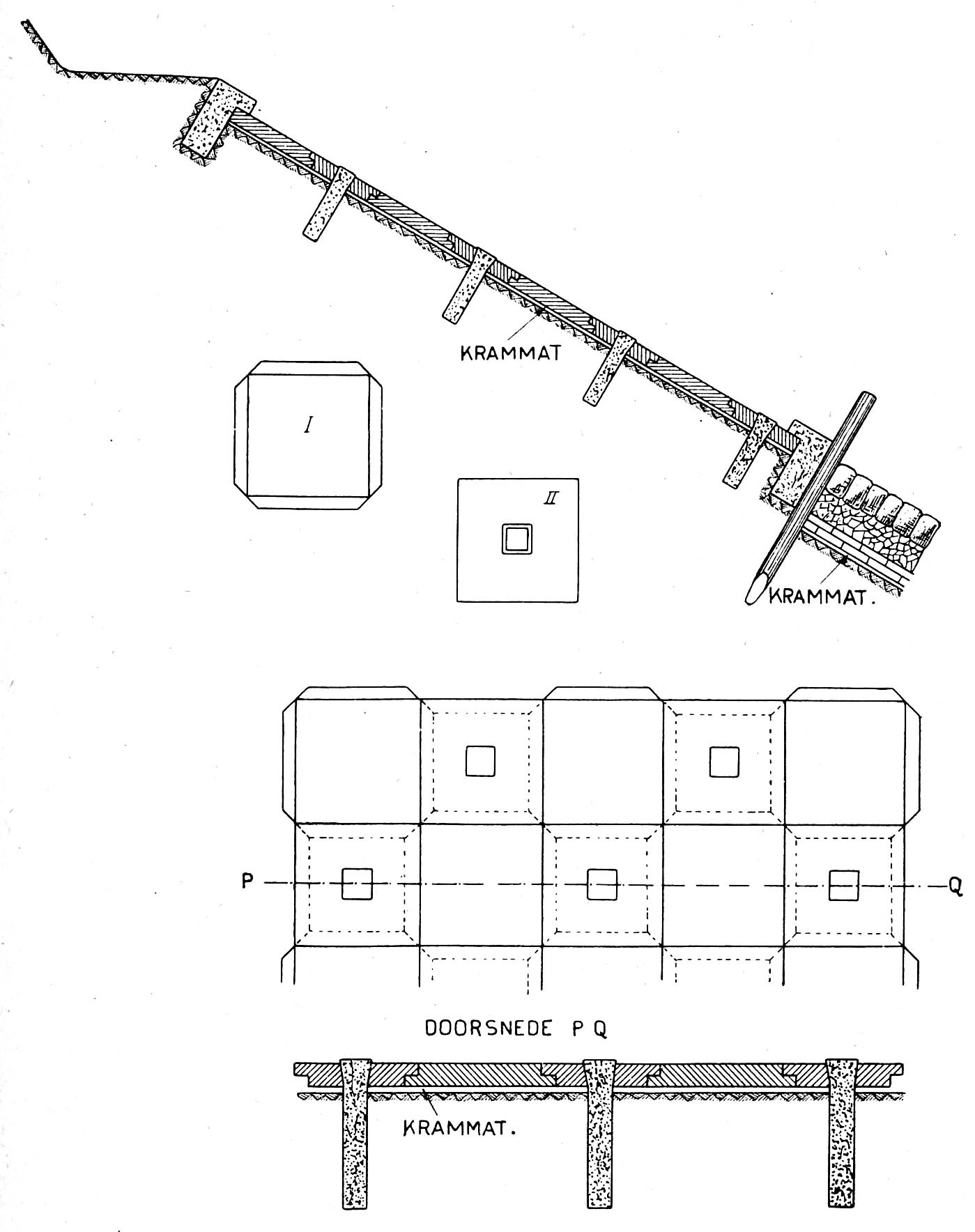 Spijkerglooiing, op basis van een ontwerp van ir. De Muralt